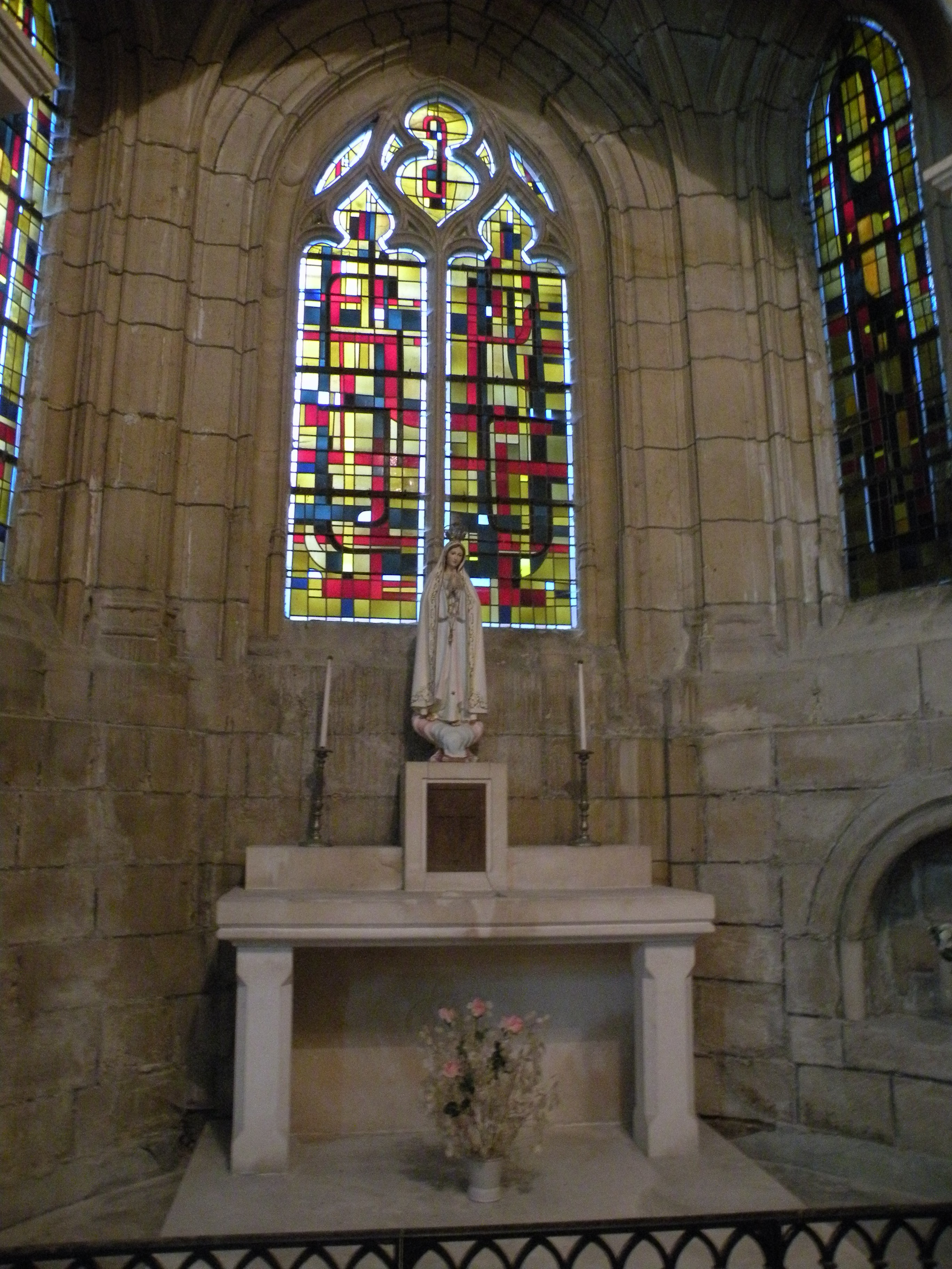 Chapelle absidiale reconstruite au XVIe siècle.